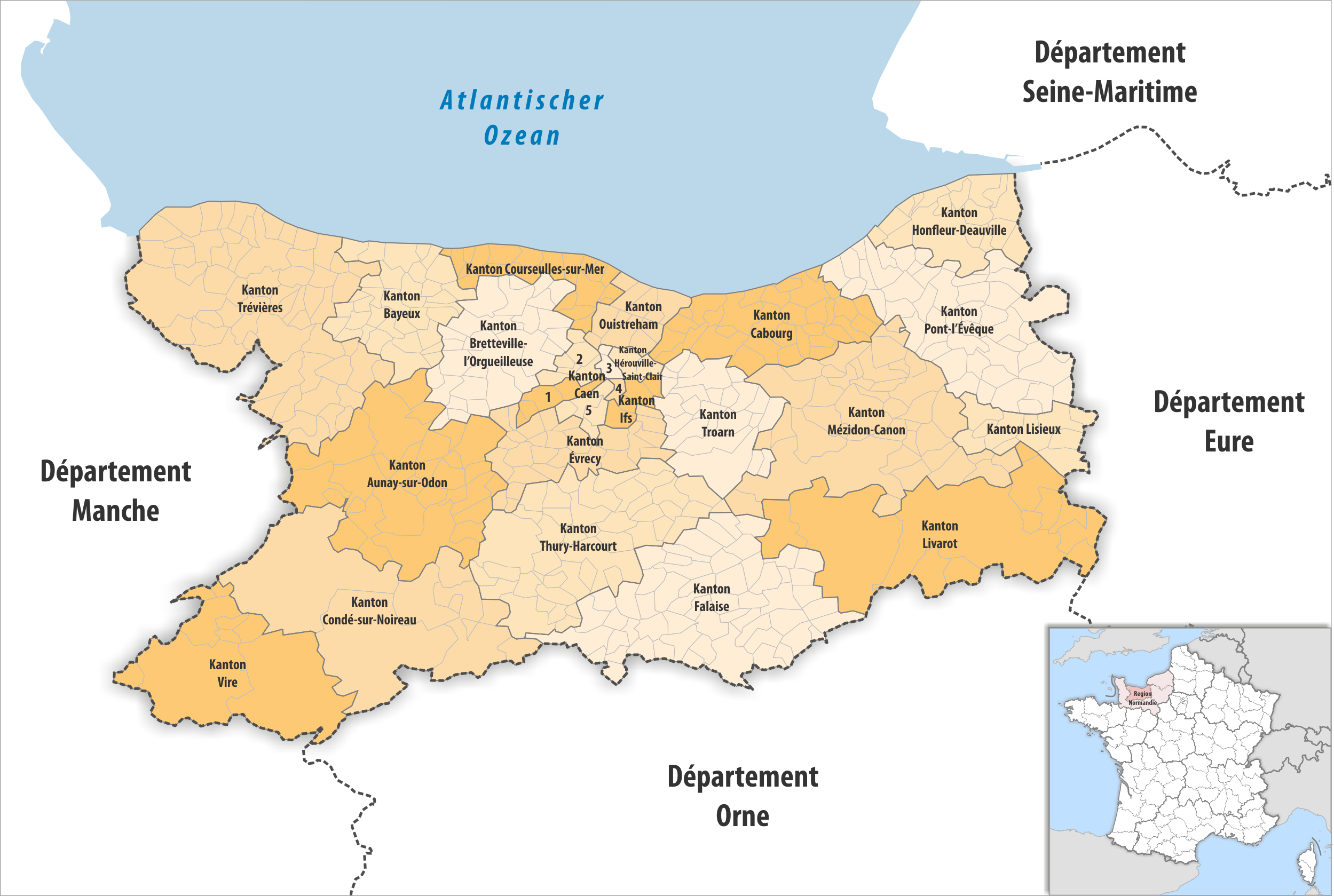 Gemeinden und Kantone im Departement Calvados